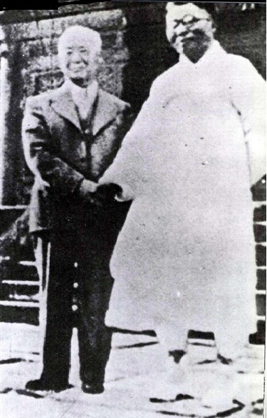 Syngman Rhee and Kim Gu in 1946, Deoksoo-gung, Seoul